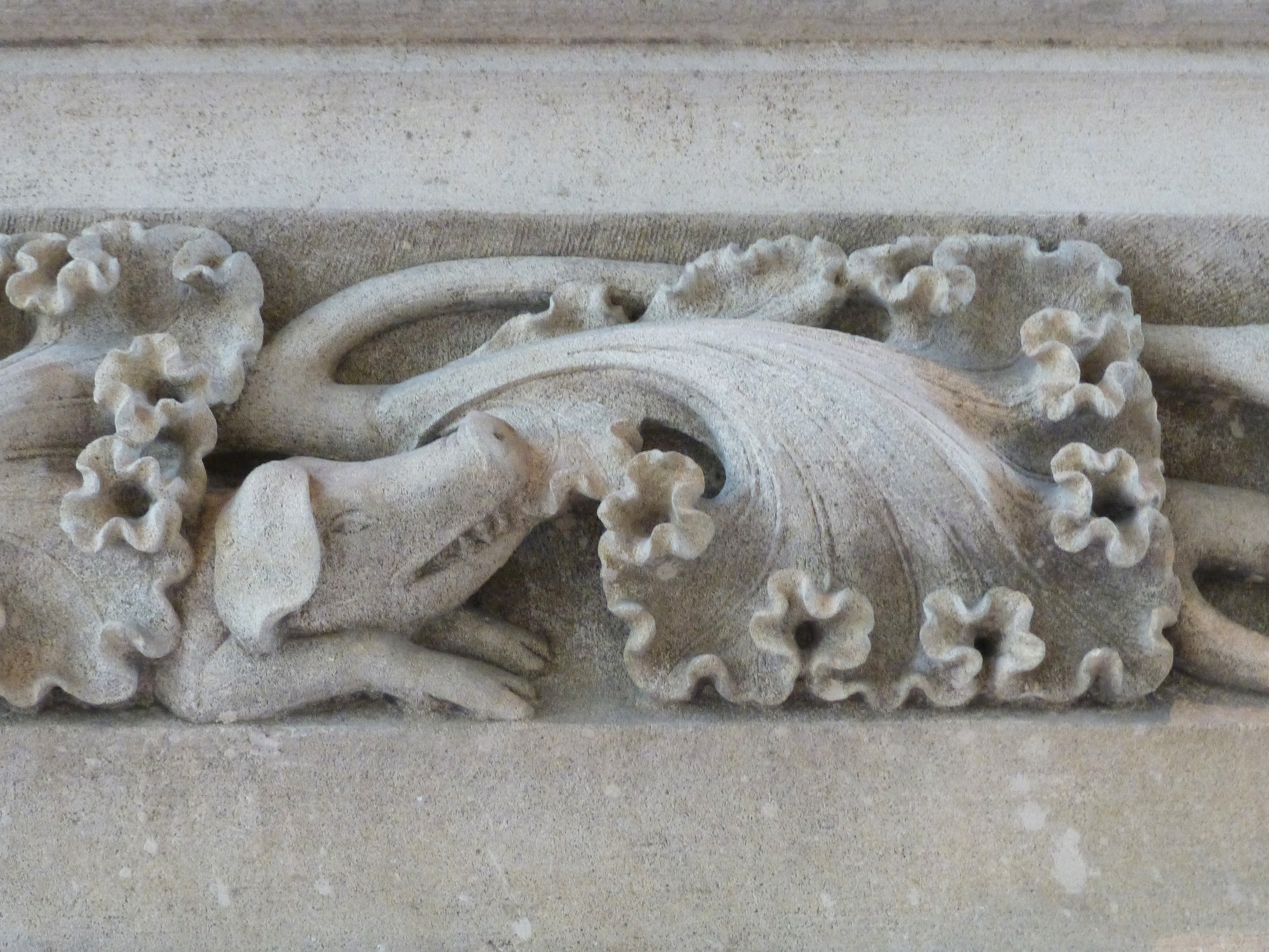 Bourges (Cher) : Palais Jacques-Cœur, salle des Festins, manteau de la cheminée sculpté, restauré au 19e s.